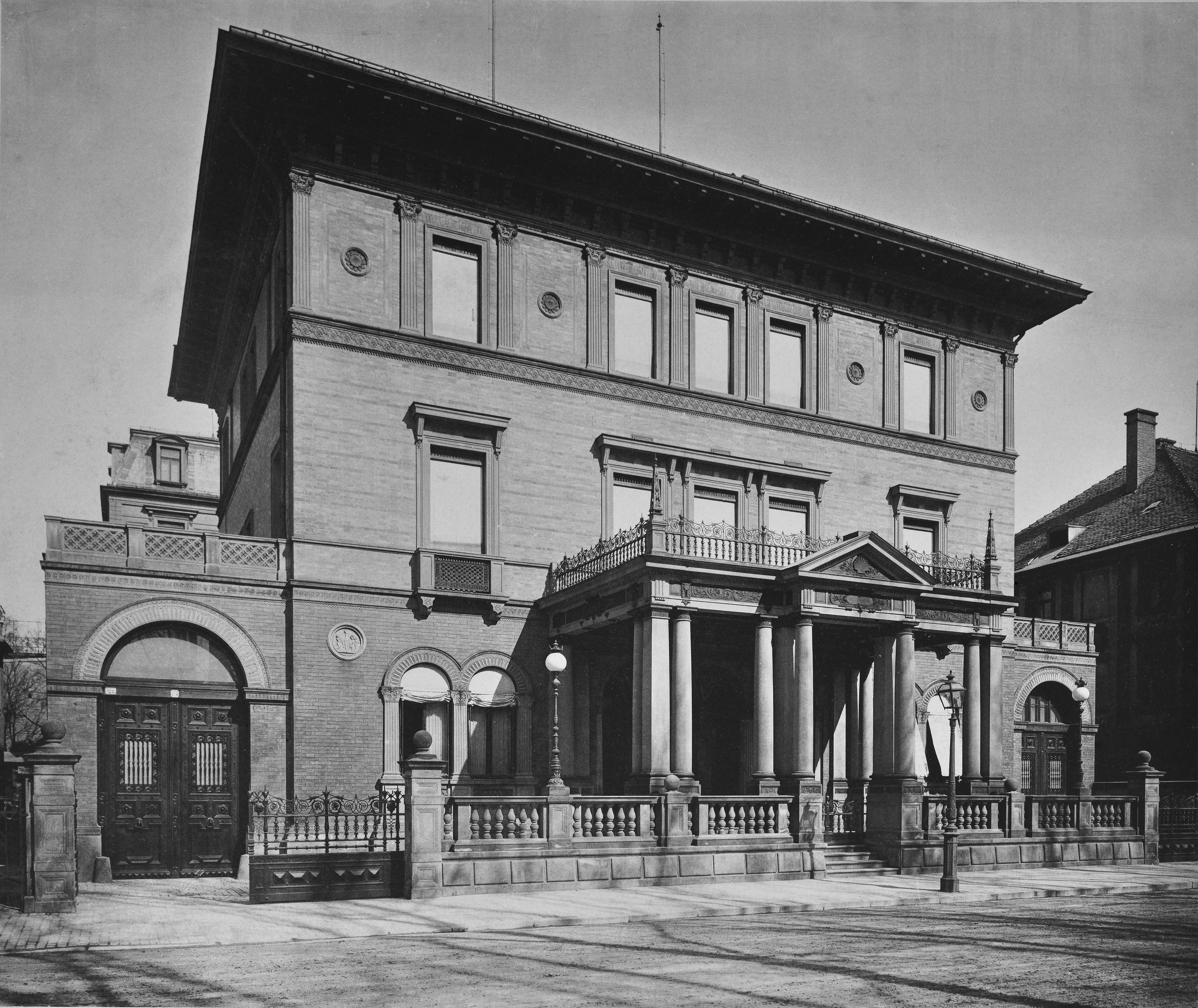 München. Fassadenansicht, Ottostraße 9. Nach dem Umbau im Jahr 1884.